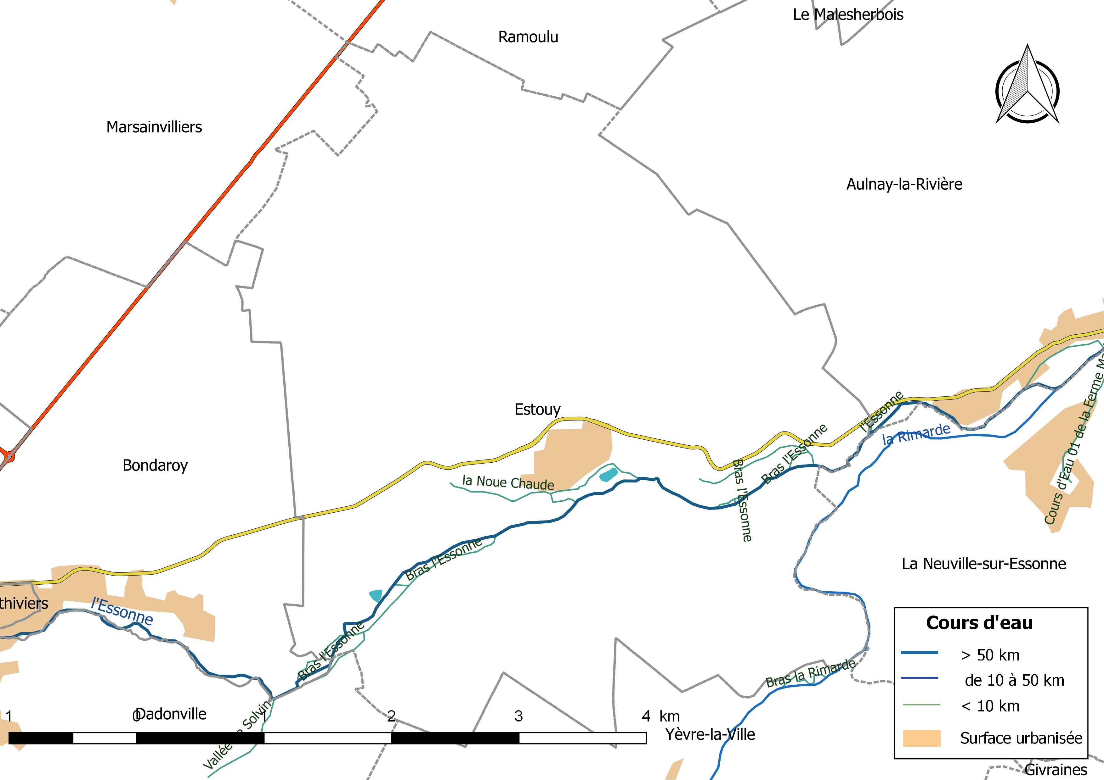 Carte du réseau hydrographique de la commune de Estouy (France).